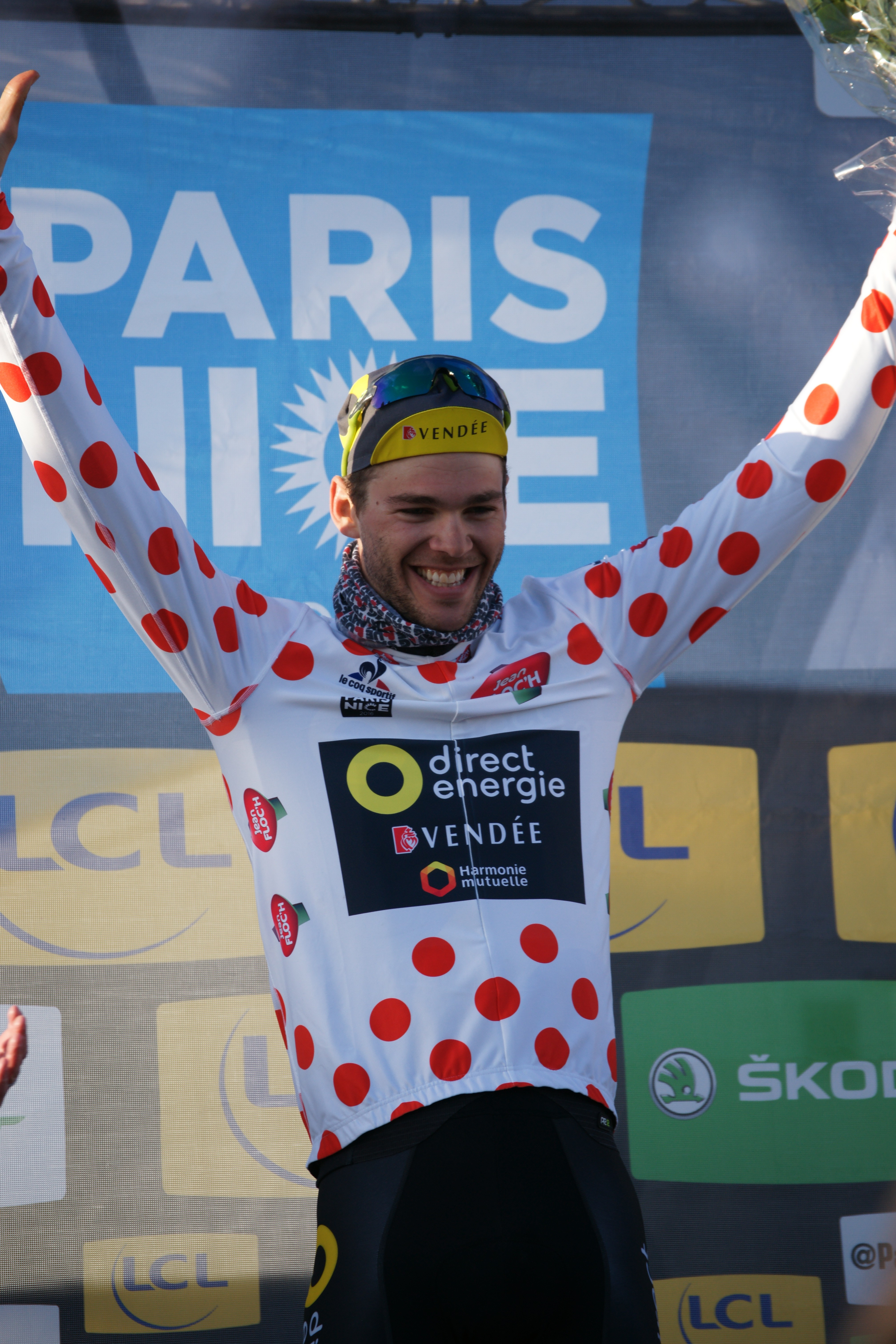 Antoine Duchesne Madone d'Utelle 2016 Depicted person: Antoine Duchesne Depicted team: Direct Énergie